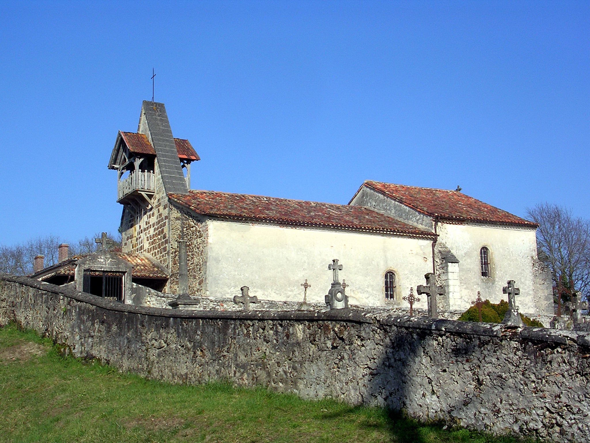 Église Saint-André d'Argelouse, dans le département français des Landes